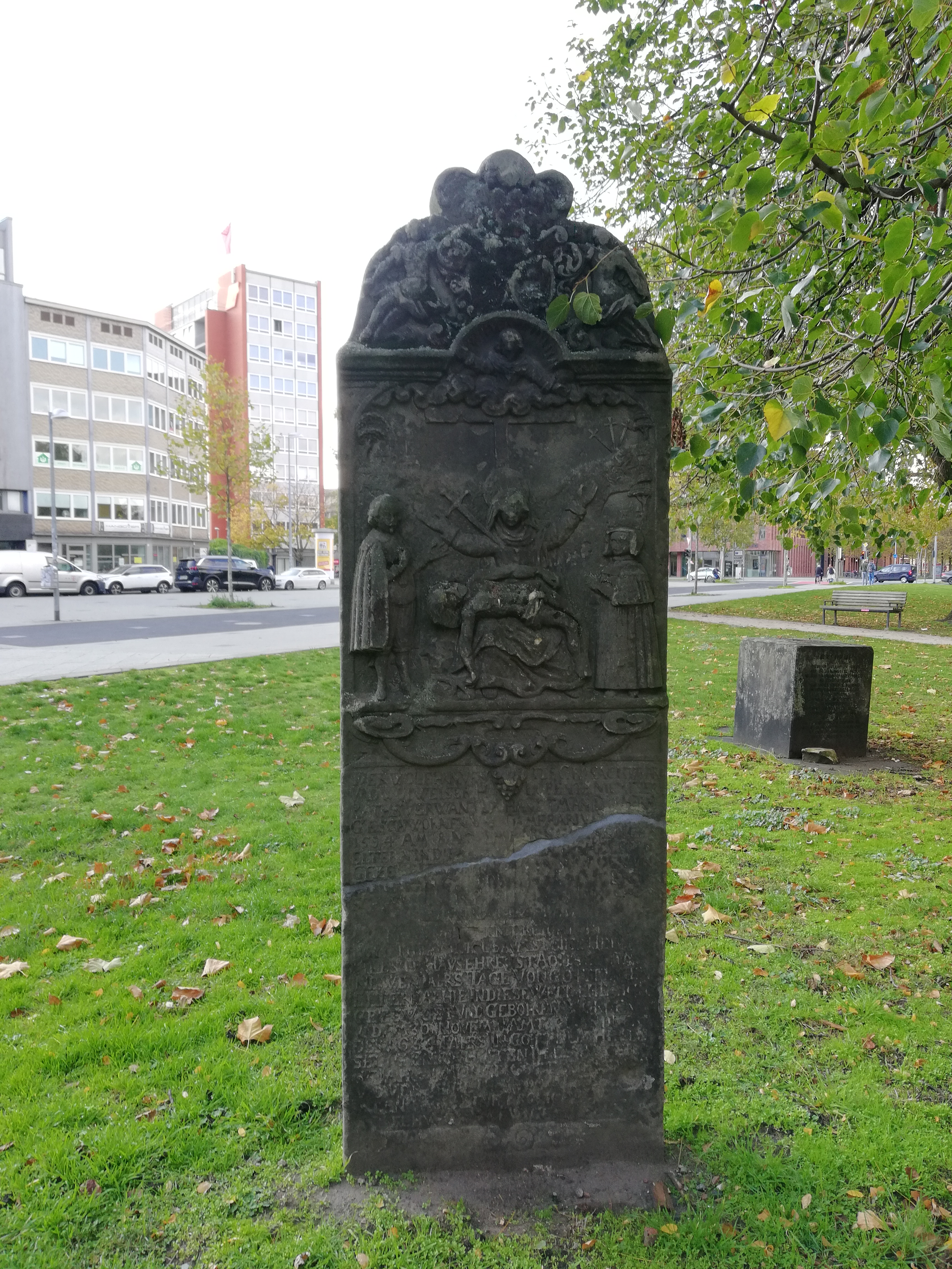 Das 1654 auf dem Alten St. Nikolai-Friedhof vor Hannover aufgestellte Standmahl für Lorentz Niemeyer und dessen Ehefrau Dorothea Niemyer stammt mutmaßlich aus der Werkstatt des Bildhauers Peter Köster ...